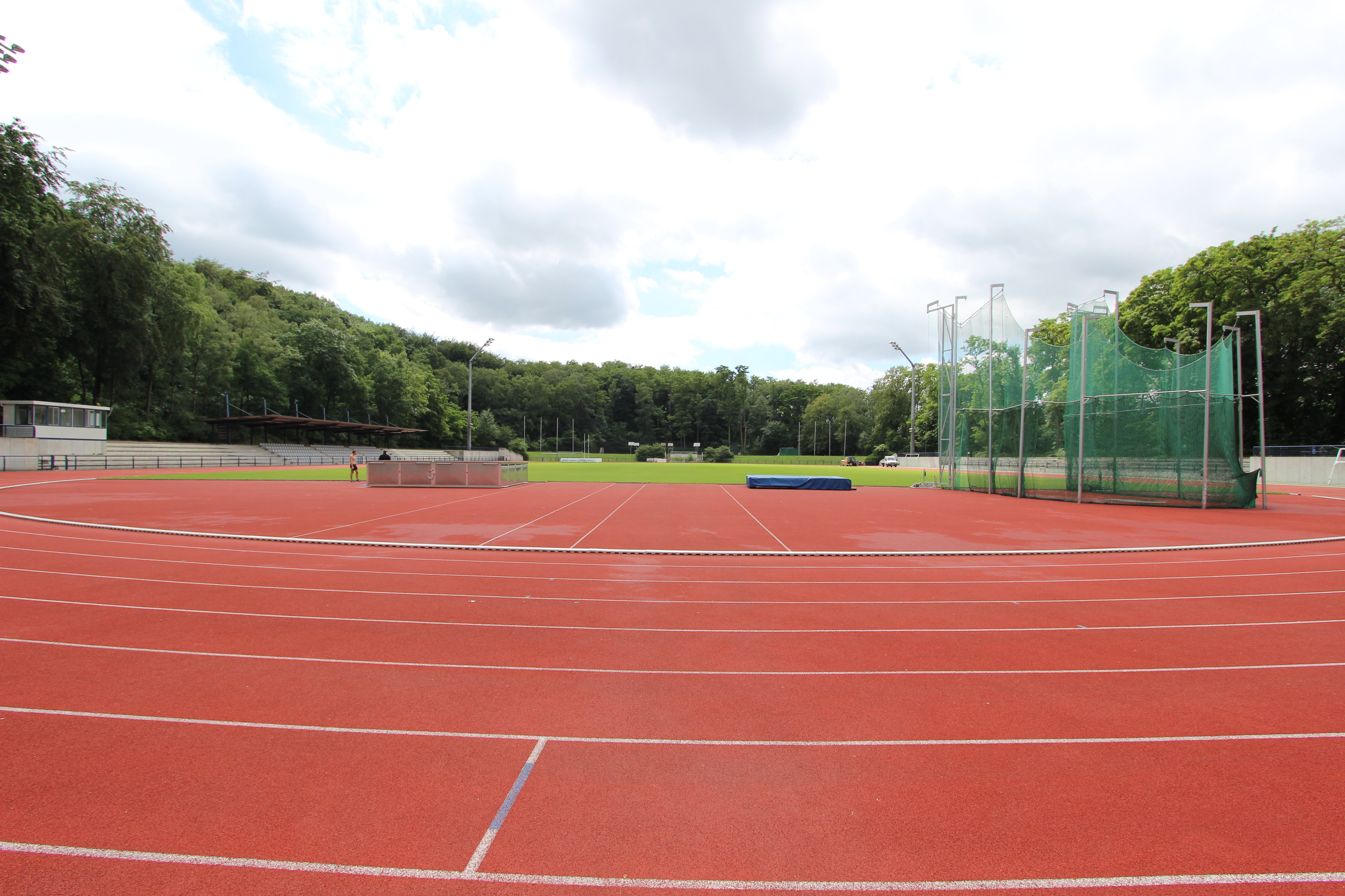 Rather Waldstadion Wilhelm-Unger-Str. 5 in 40472 Düsseldorf. Aufnahme aus Nord-Osten von 2016.